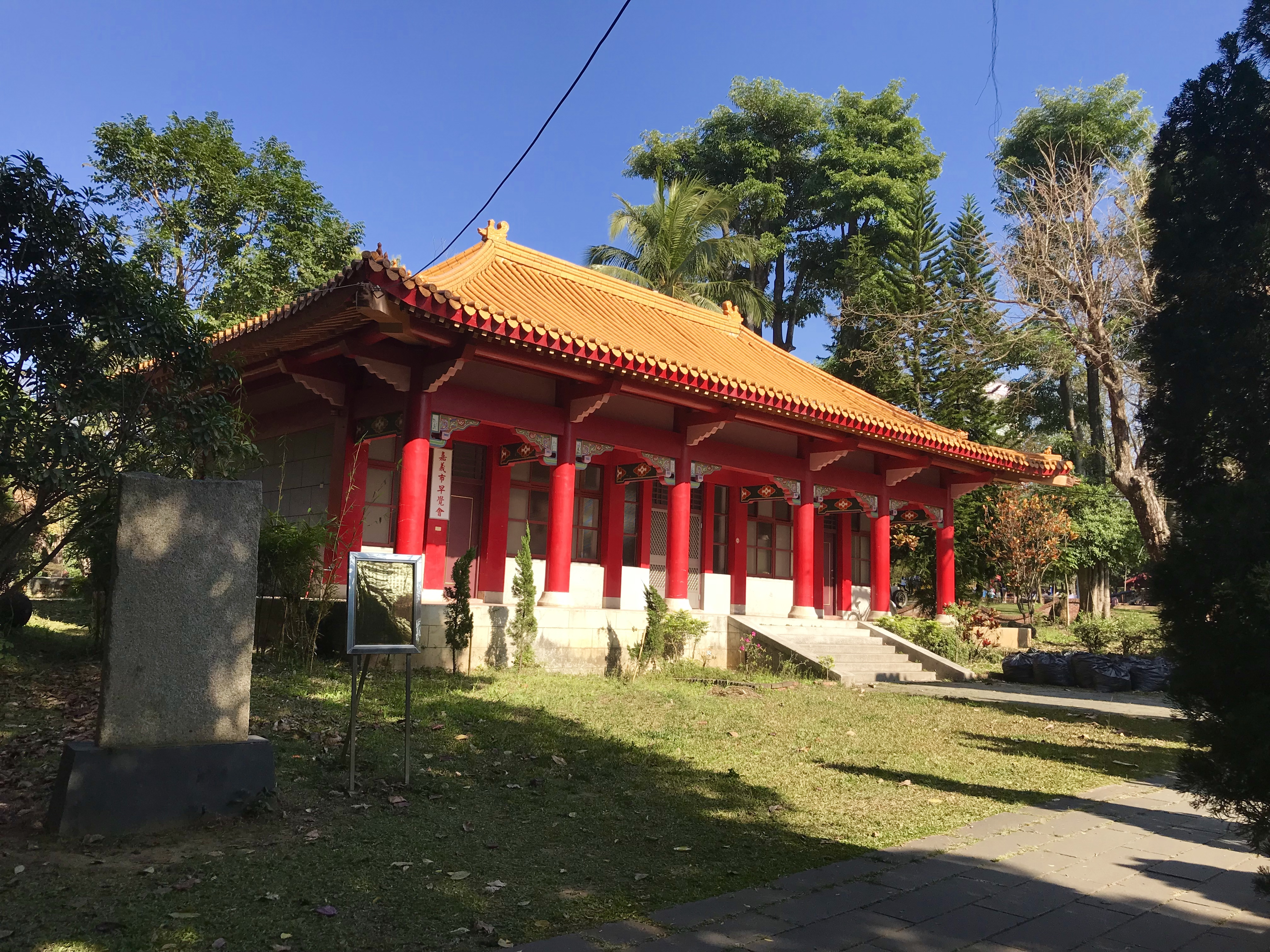 中文（台灣）: 嘉義市早覺會與重修玉峰書院碑